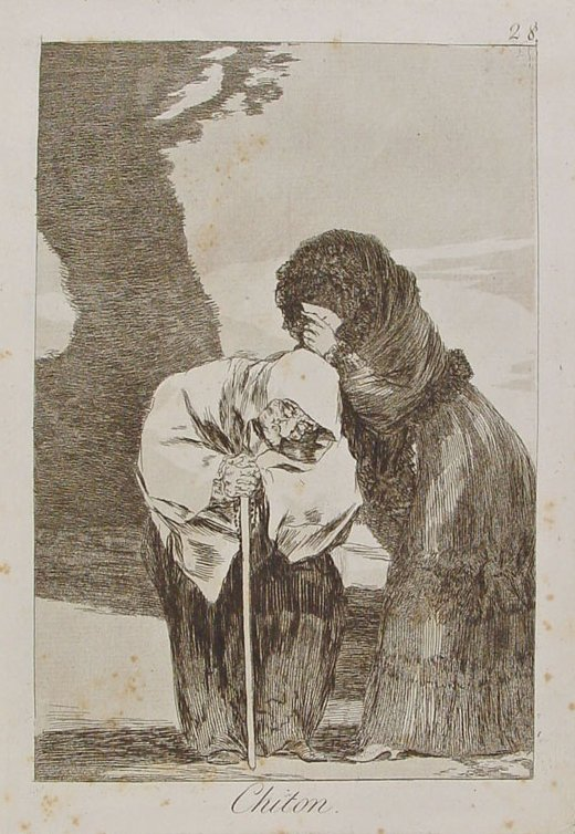 Capricho nº 28: Chitón de Goya, serie Los Caprichos